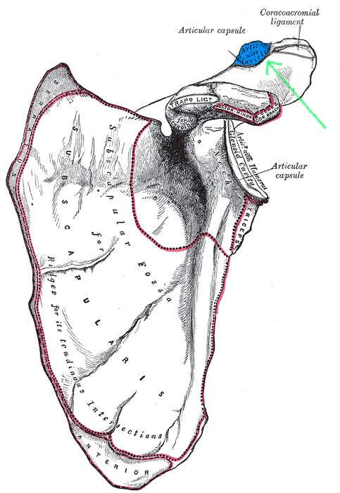 Clavicular facet of scapula